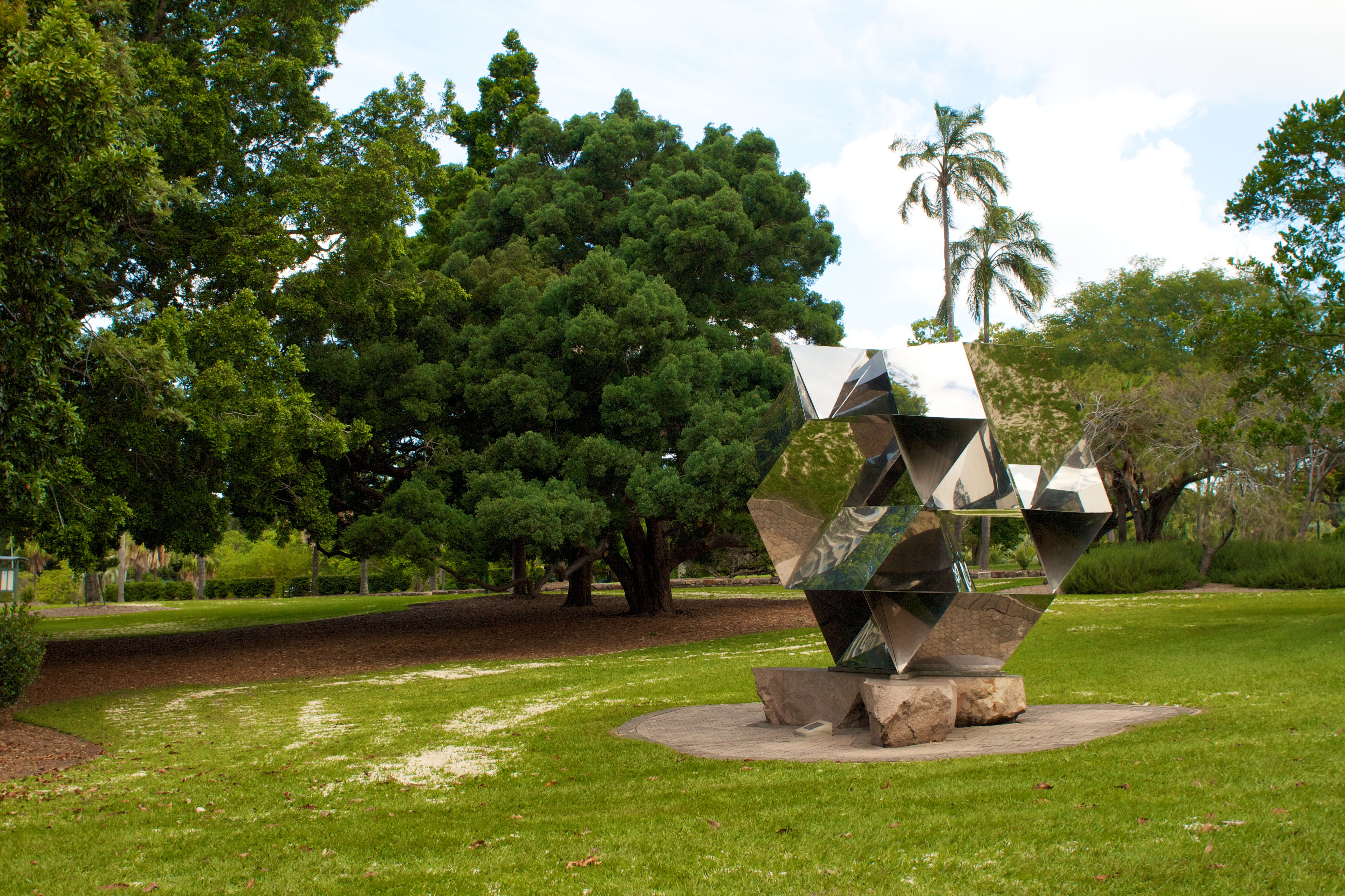 Brisbane Botanical Gardens 2